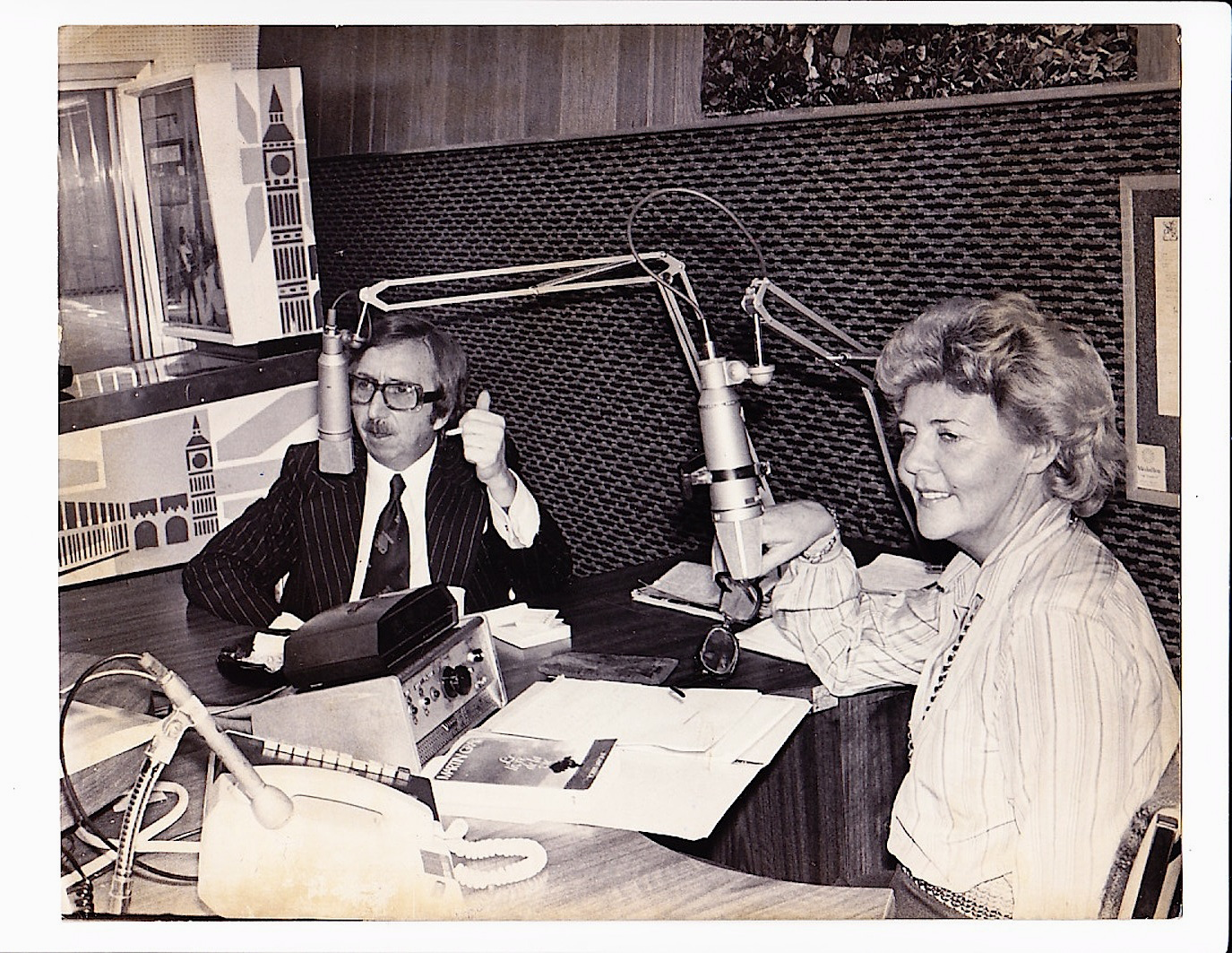 Émission Radio confidences avec Solange Harvey et Pierre Péladeau de Québecor, à CKVL-AM, Montréal, Québec, Canada (1978)